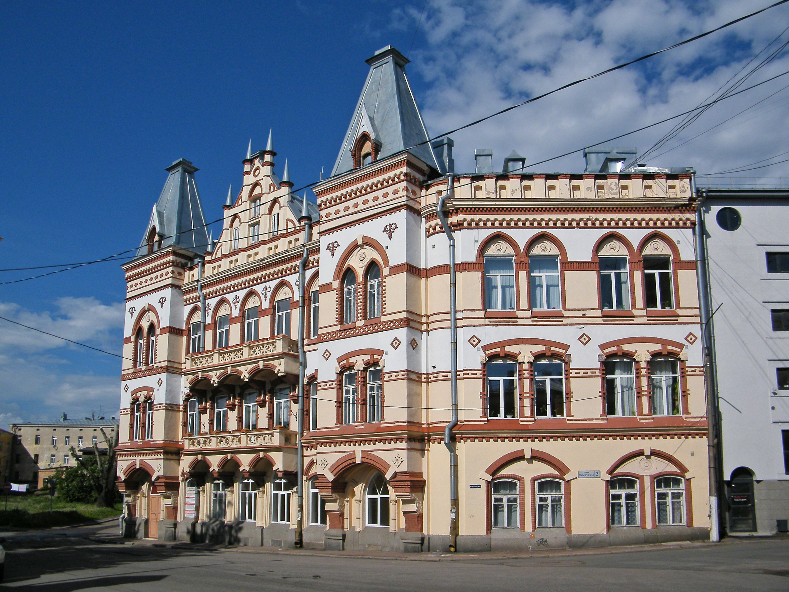 Дом Дагермана